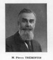 Homme politique français (1876-1966) né à Plouescat et maire de la ville plus tard. il aura été Conseiller Général du canton et député du Finistère.